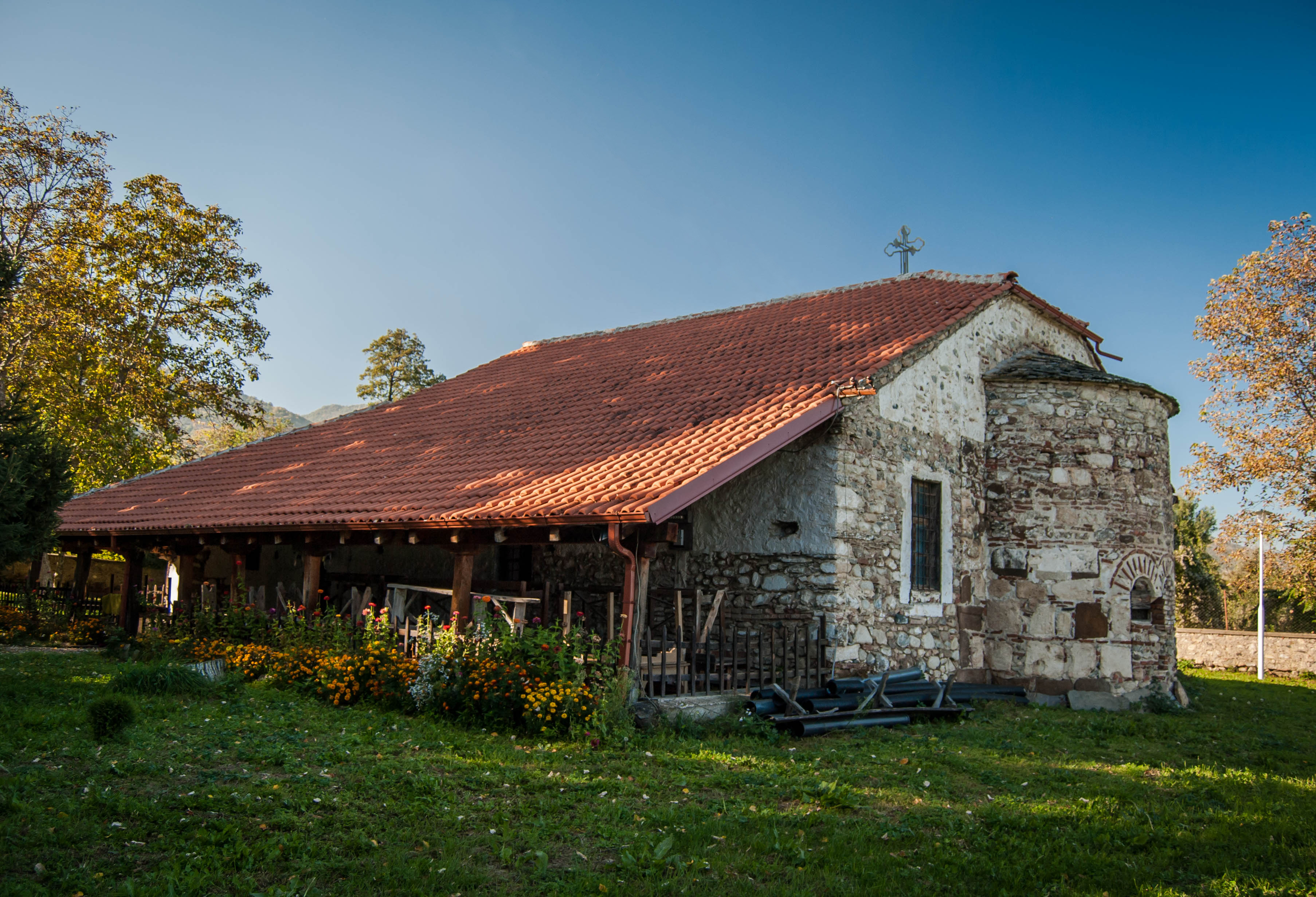 Црква „Успение на Пресвета Богородица“, главната селска црква во Велушина.